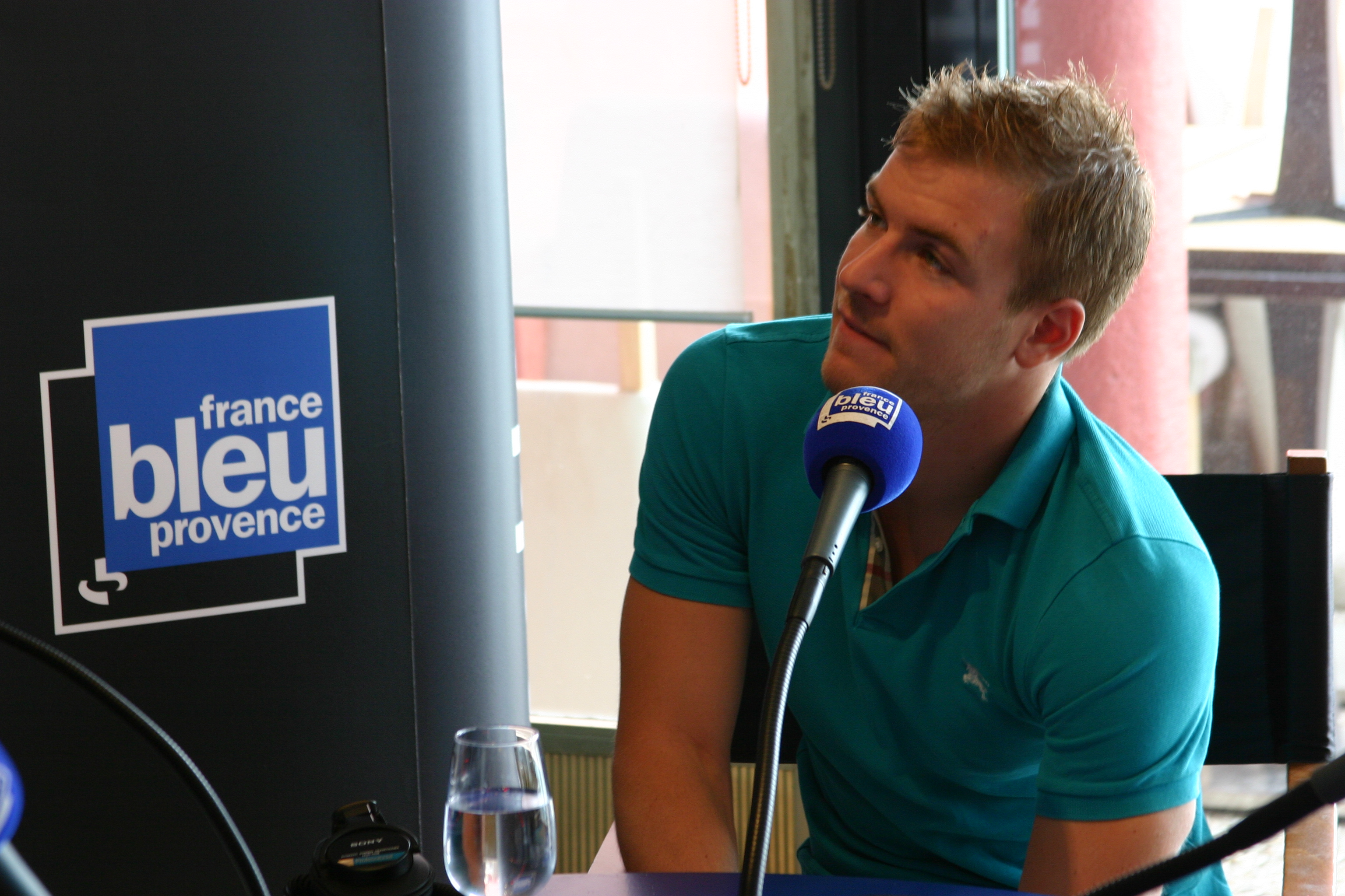 Yoris Grandjean au Cercle des Nageurs de Marseille sur France Bleu Provence, juin 2012.